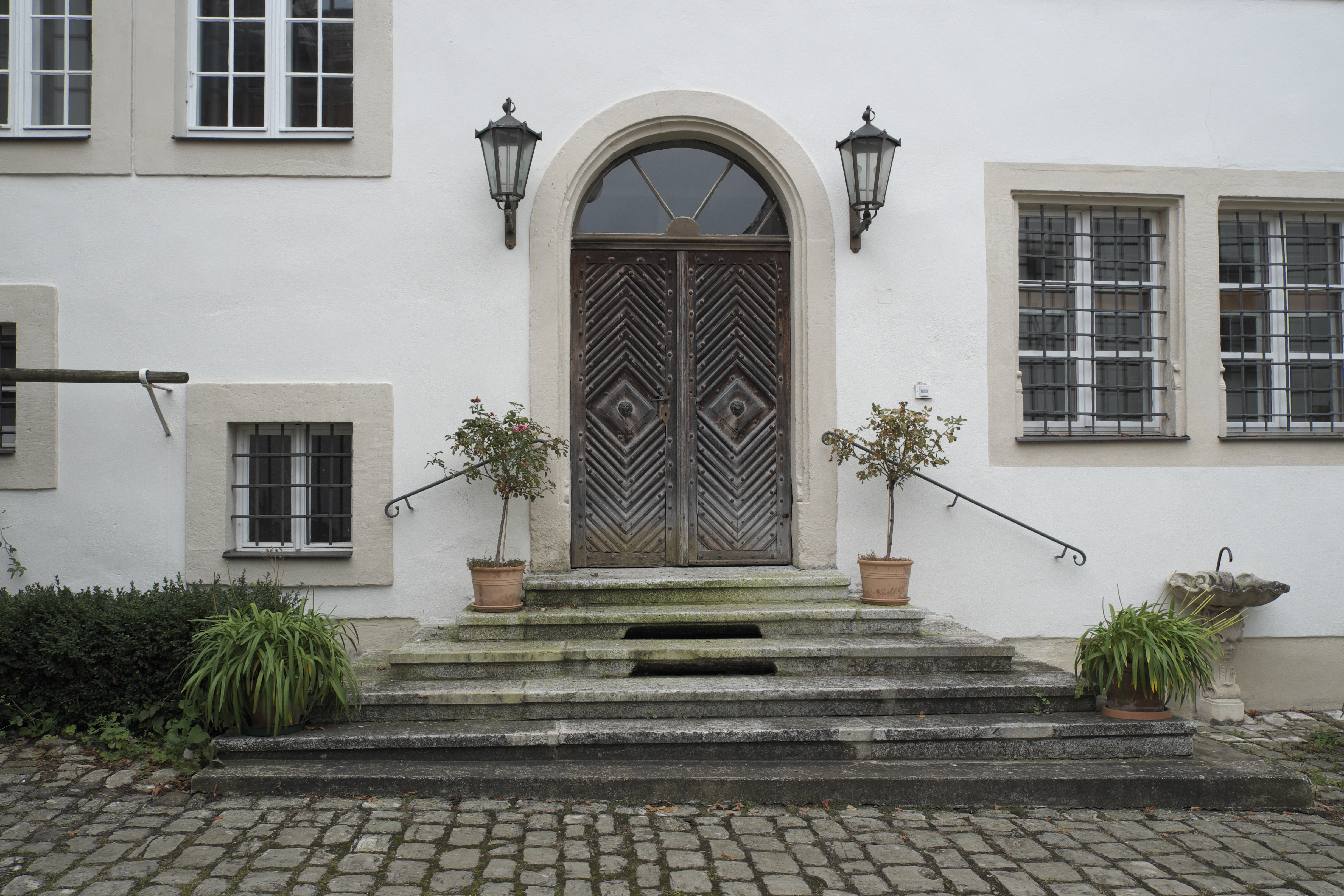 Hotel Römischer Kaiser in Ellingen im Landkreis Weißenburg-Gunzenhausen (Mittelfranken/Bayern), Eingangstür der Nordseite vom Innenhof